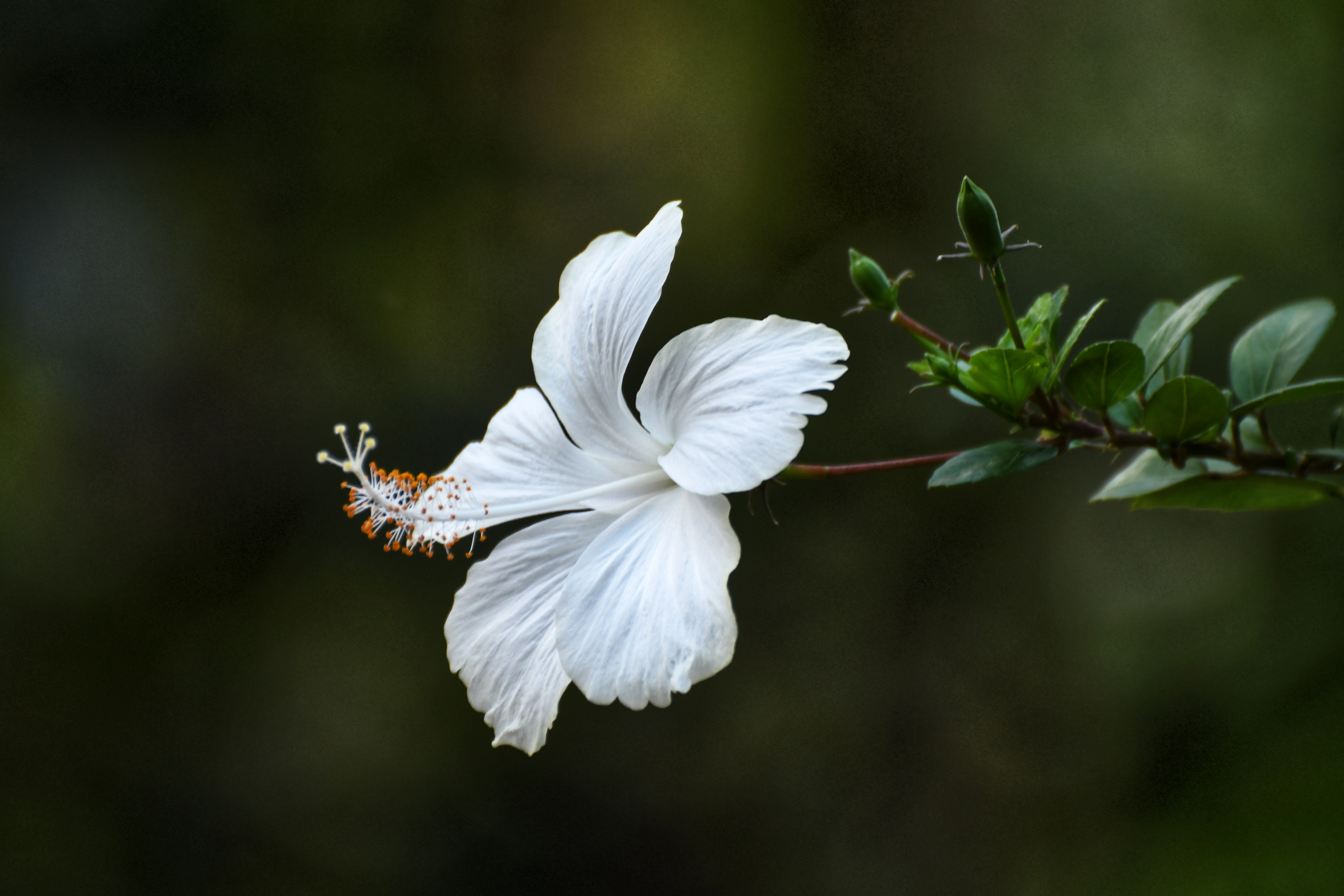 ചെമ്പരത്തി